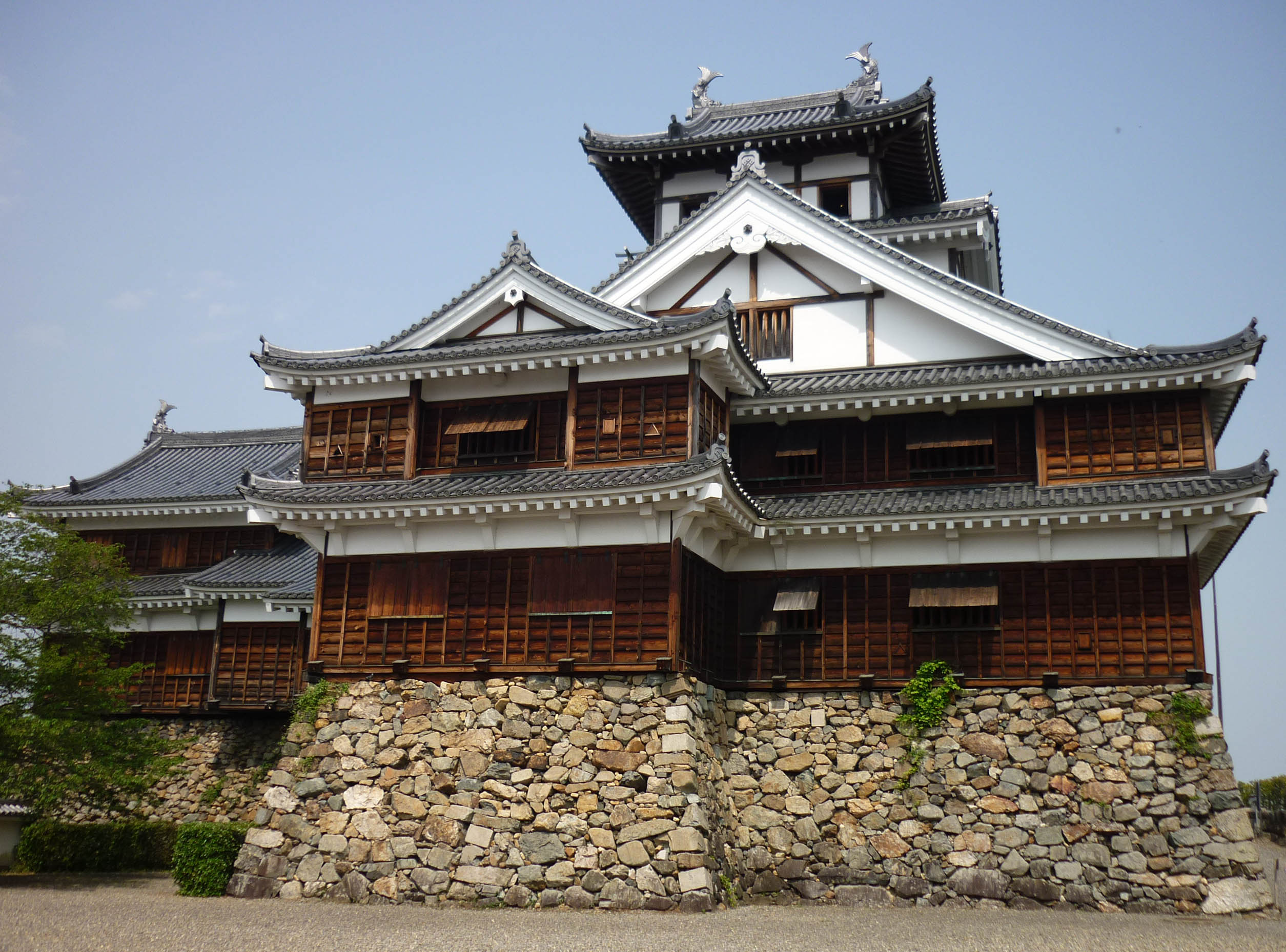 模擬天守